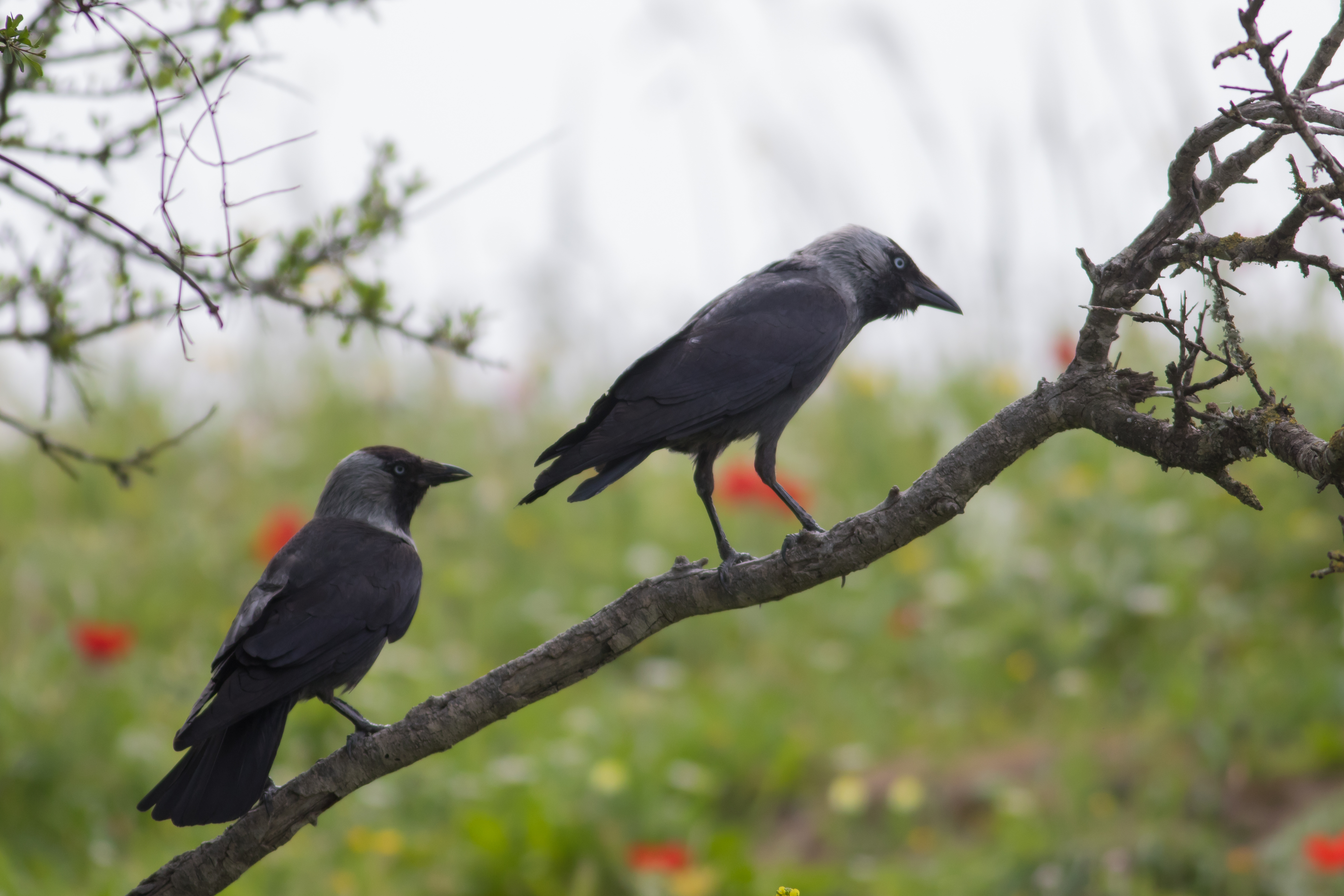 קאק בהרי ירושלים